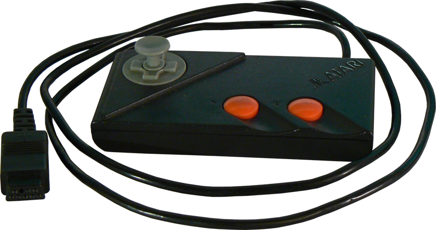 Manette de jeux pour Atari 7800